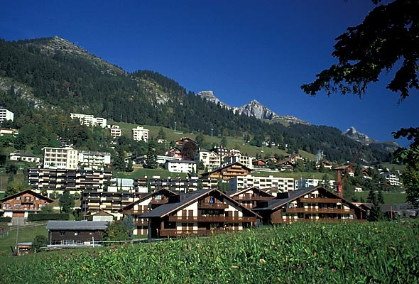 Leysin